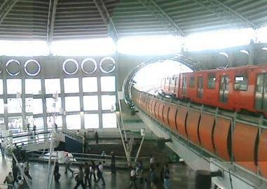 panoramica de la estacion san lazaro de la linea b